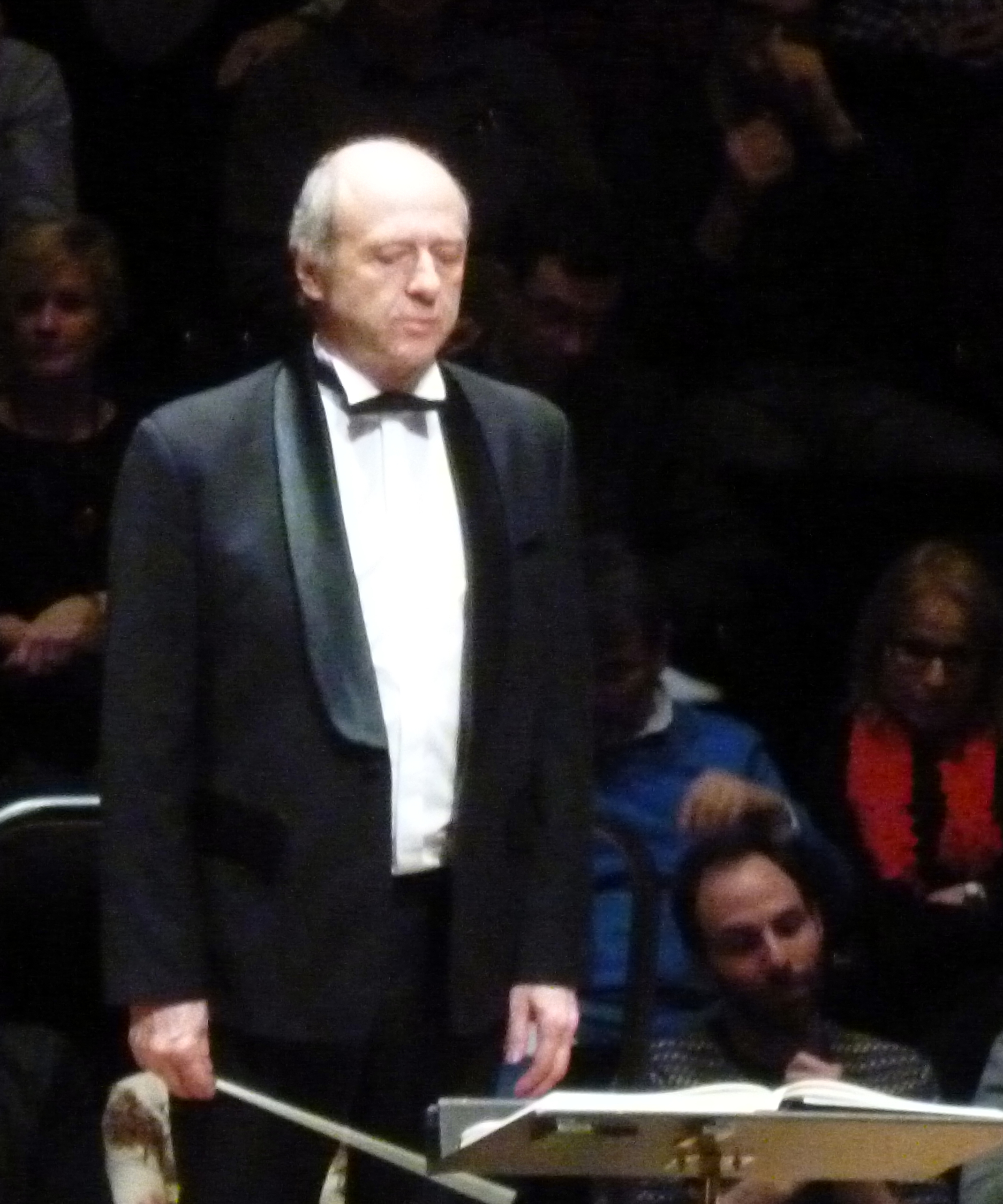 Iván Fischer lors du concert du 10 mars 2017 à la Philharmonie de Paris avec le Budapest Festival Orchestra.